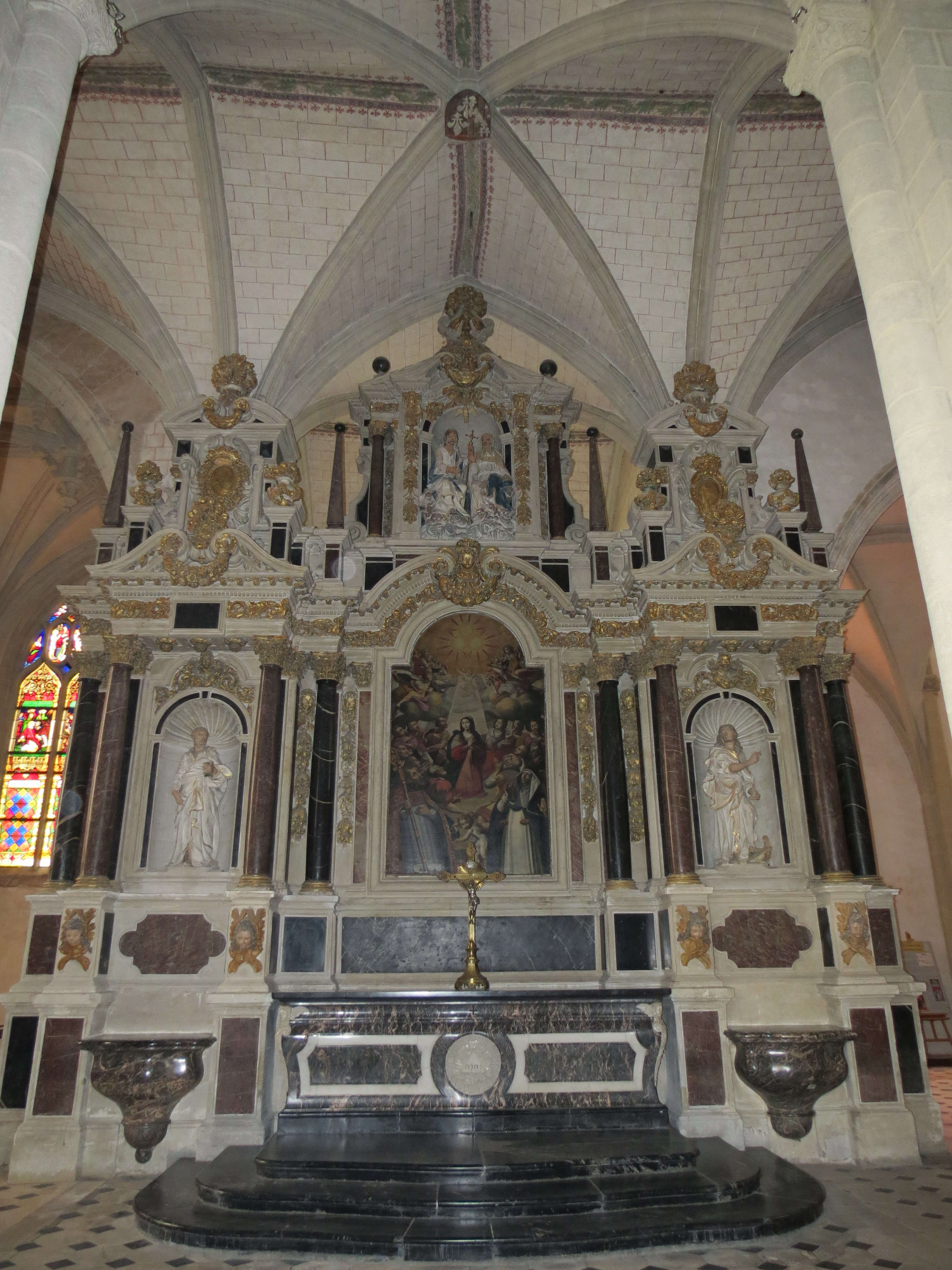 Maître-autel de la cathédrale de la Sainte-Trinité de Laval, Mayenne, Pays de la Loire.